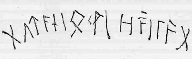 Inscripția cu rune de pe colanul de la Pietroasa